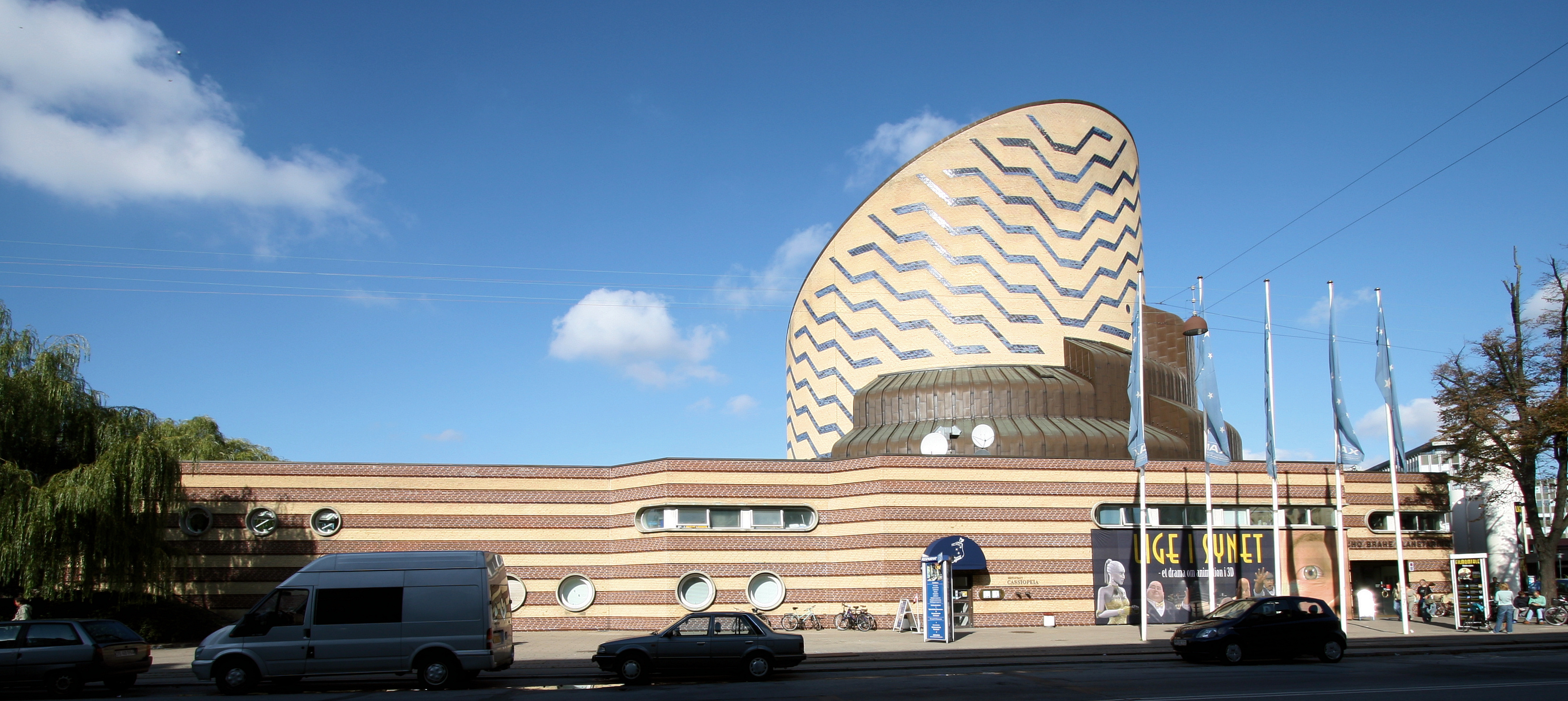 Tycho Brahe Planetarium, Copenhagen, Denmark. Front.